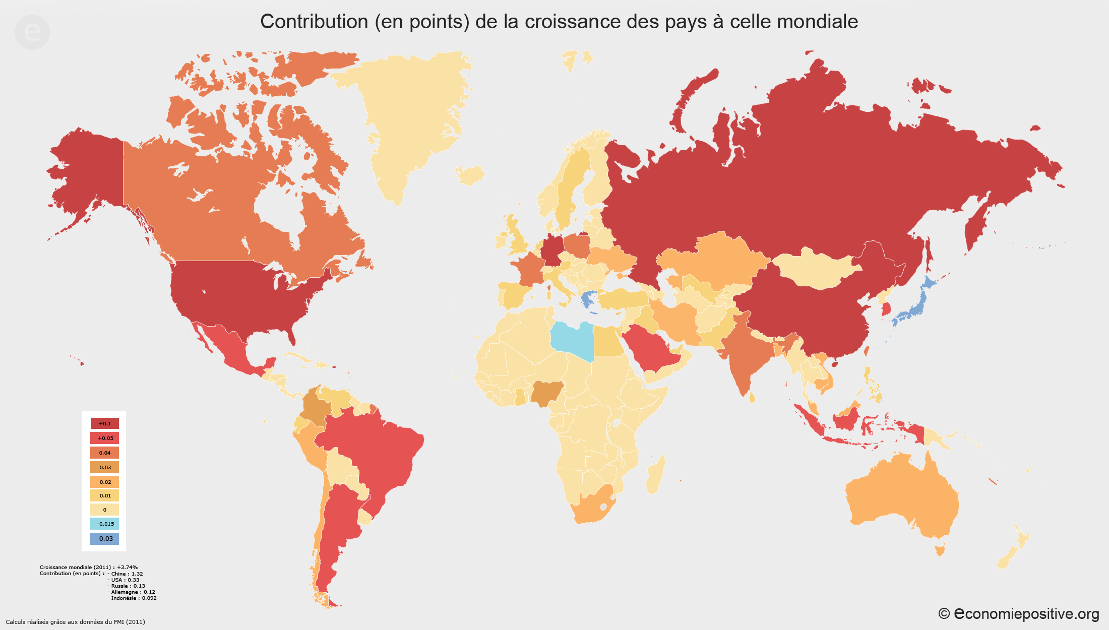 La sensibilité de la carte est très forte. Voir légende pour s'en rendre compte.